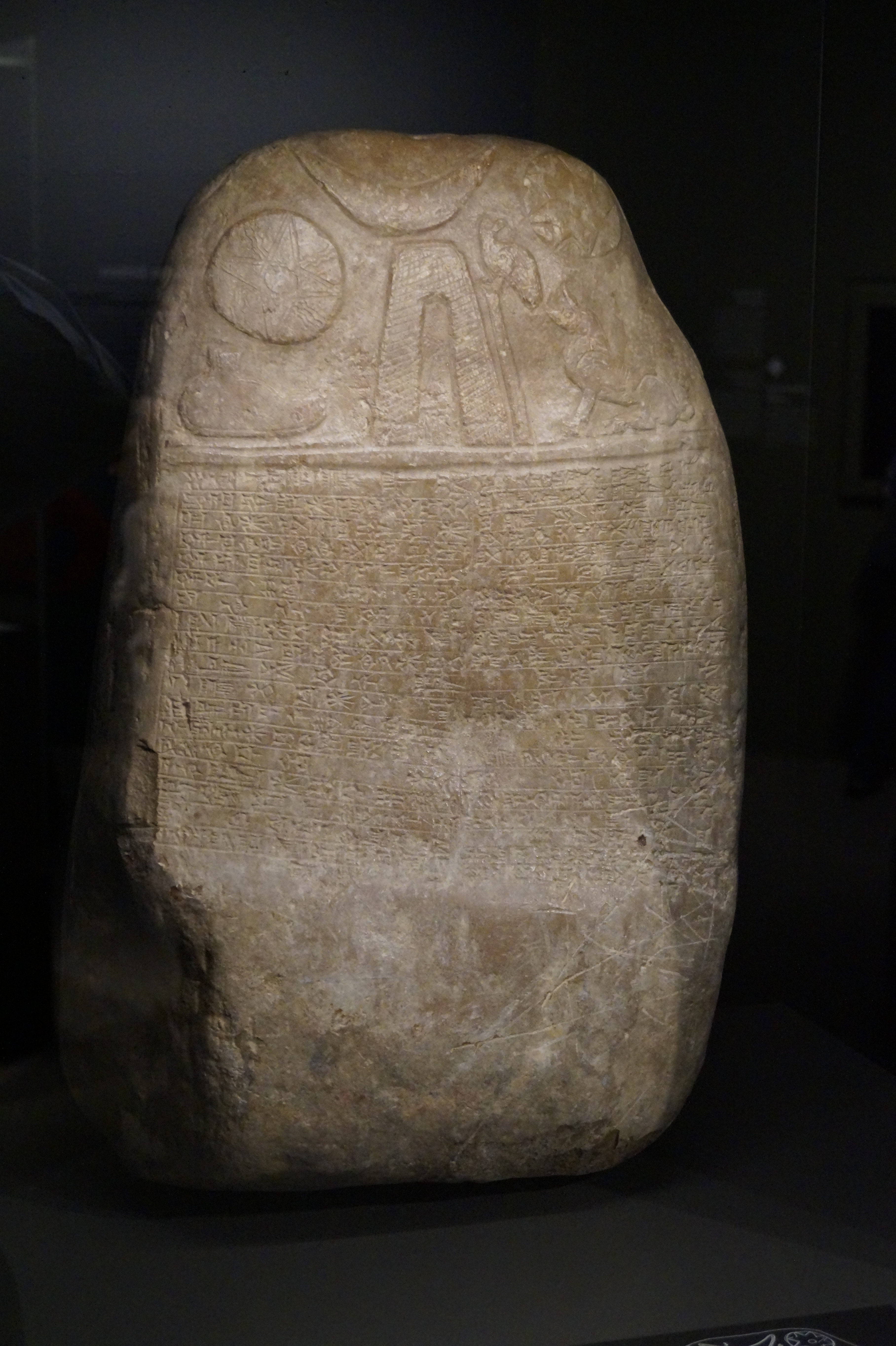 Die Ausstellung "Iran. Frühe Kulturen zwischen Wasser und Wüste" in der Bonner Kunst- und Ausstellungshalle der Bundesrepublik Deutschland zeigte vom 13. April bis 20. August 2017 Kunstgegenstände der iranischen Kulturen der Frühzeit, vom 7. bis ins 1. Jahrtausend v. Chr., und gab einen Einblick in auf eine in Europa wenig bekannte Bildwelt aus einem über Jahrzehnte verschlossenen Land.